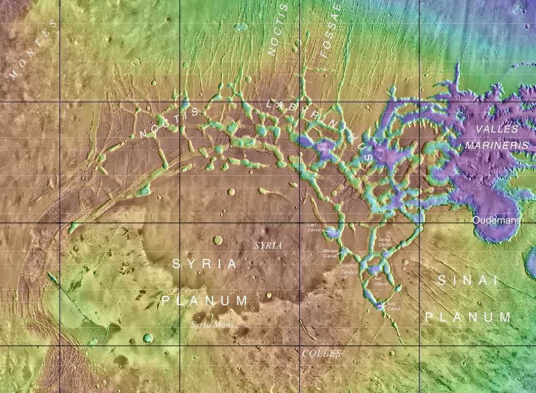 Noctis Labyrinthus (Marte).